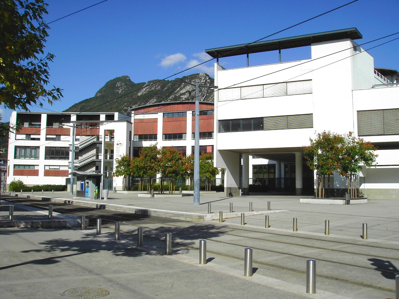 lycée international europole grenoble